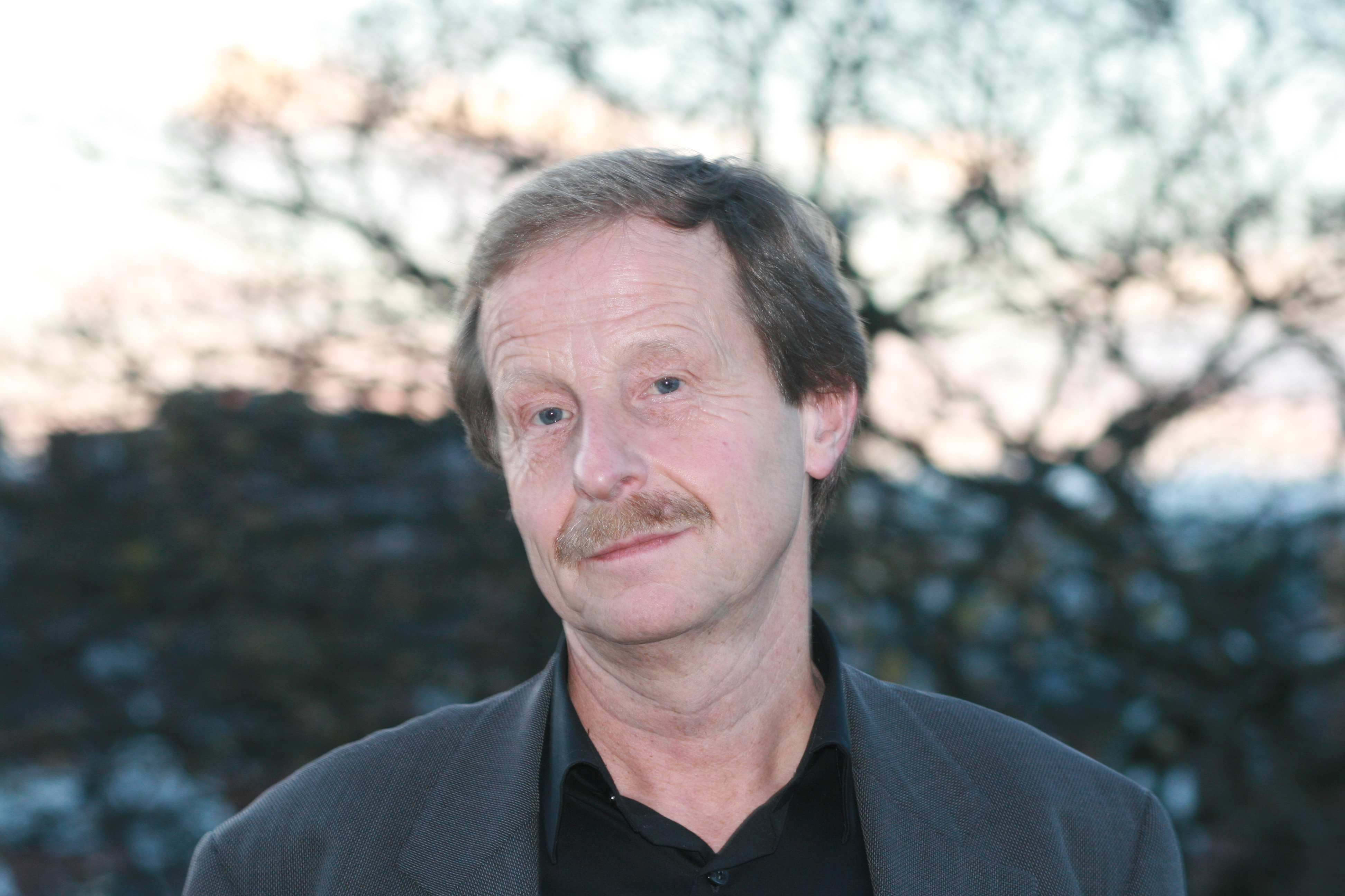 Kjartan Fløgstad, norsk forfatter.